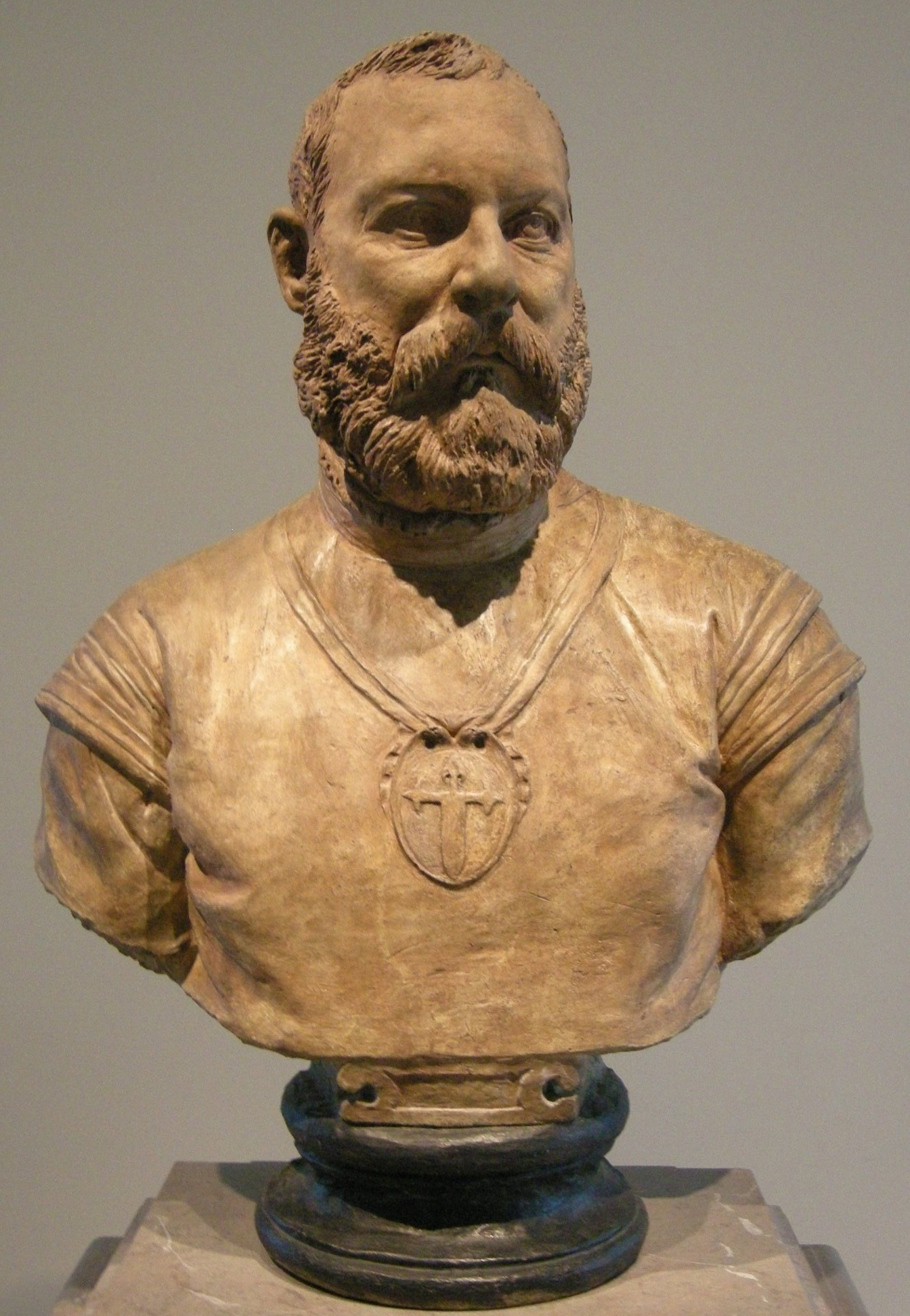 Francesco segala (attr.), cavaliere di santiago, 1570-80 circa